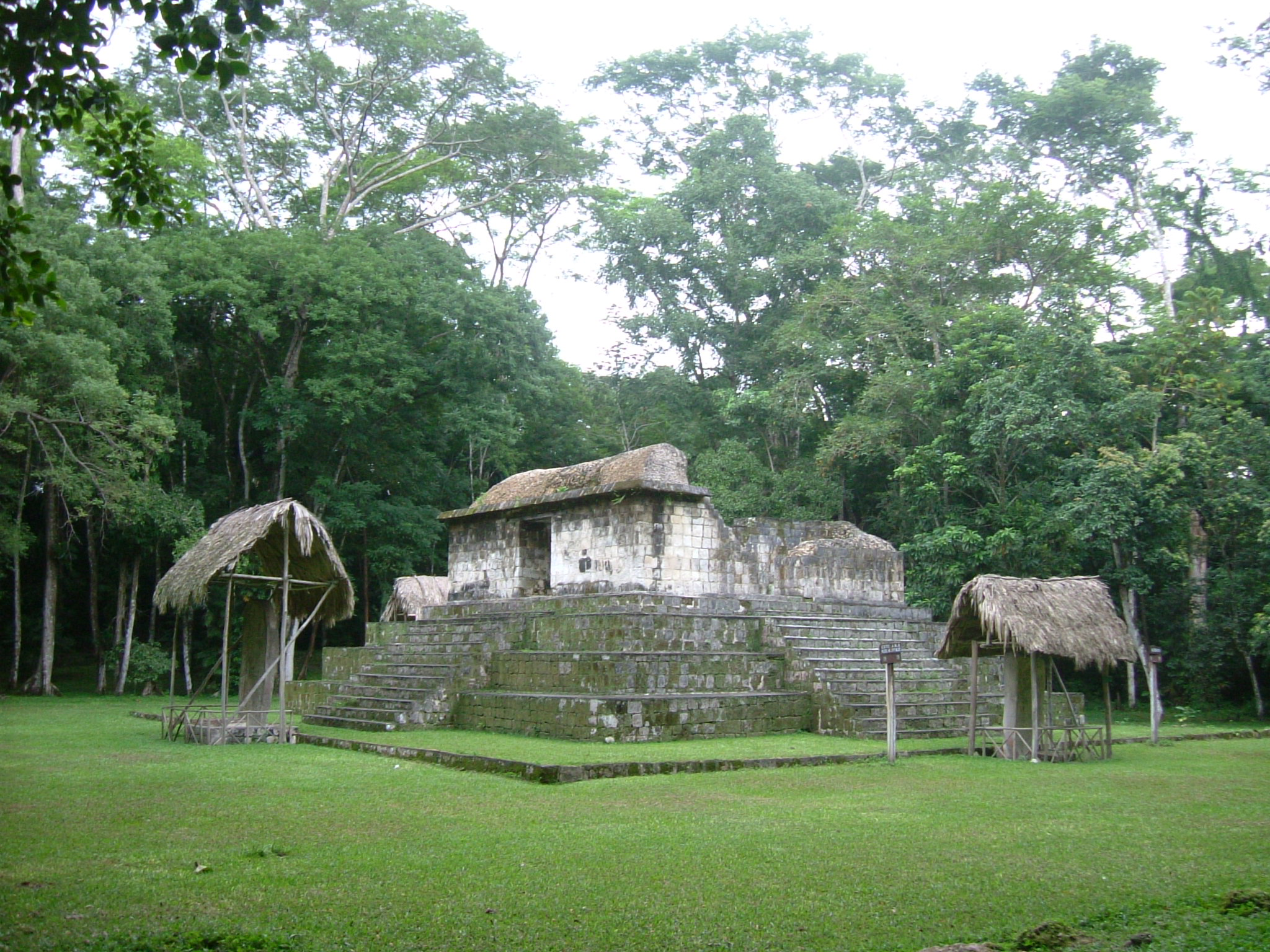 Seibal temple Plaza Sur 18.10.2006